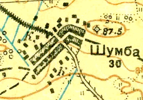 Топографическая карта Ленинградской области, квадрат О-36-14-В-а (Шумба), деревня Шумба.